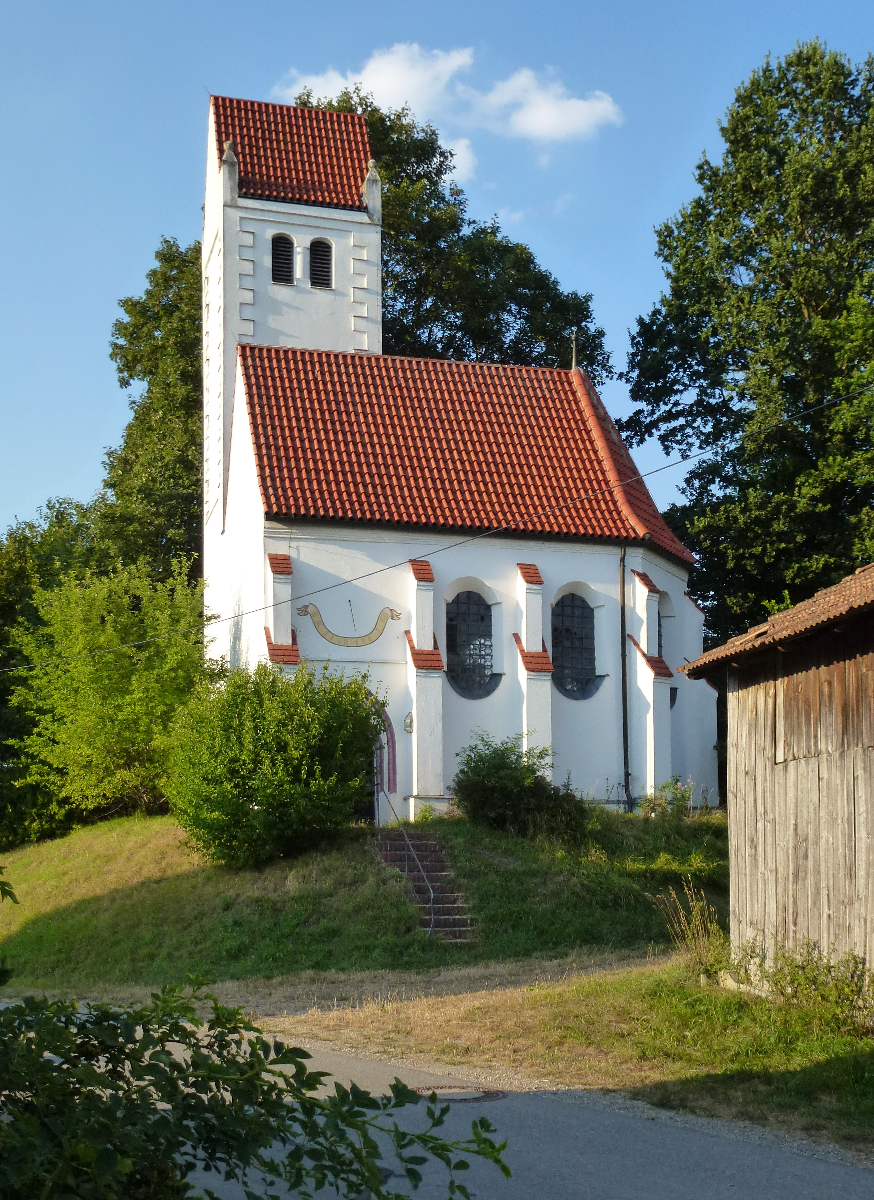 Webling (Landkreis Dachau), Webling 9: Katholische Filialkirche St. Leonhard. Spätgotischer Bau um 1500 (lt. Tafel am Eingang). Ansicht von Süden